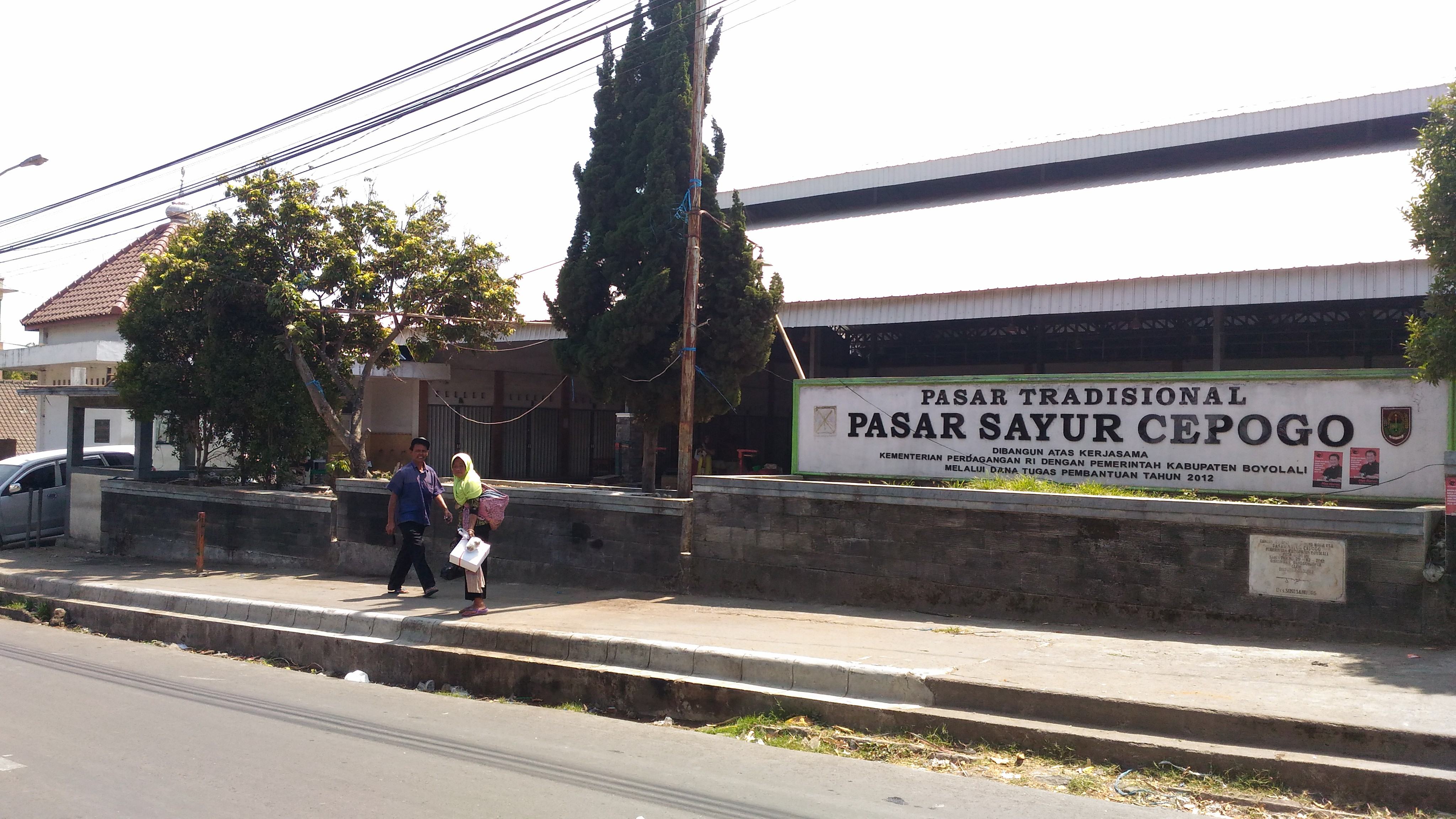 Basa Jawa: Pasar sayur